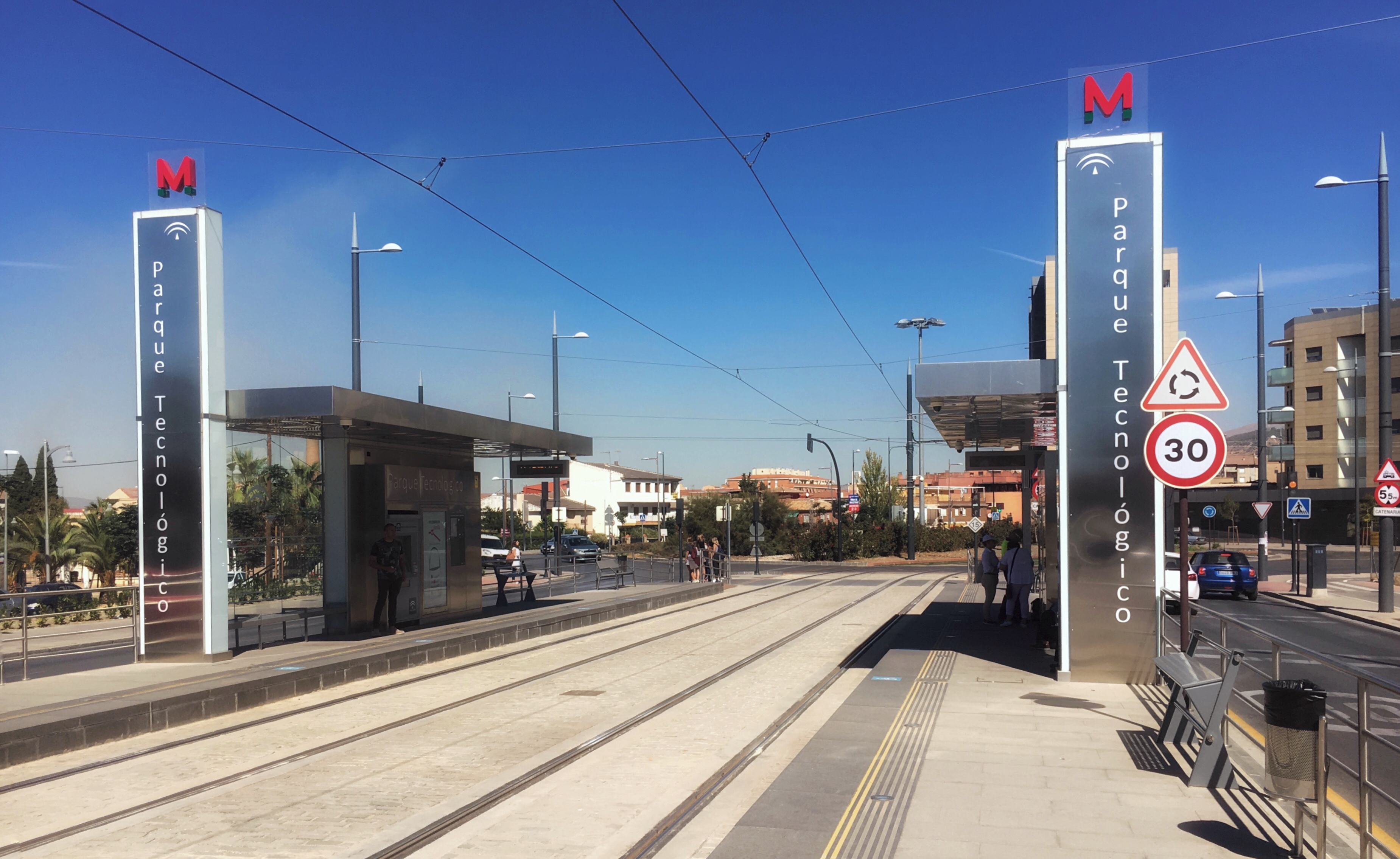 Estacion de Parque Tecnologico del metro de Granada, situada en el PTS de la ciudad.